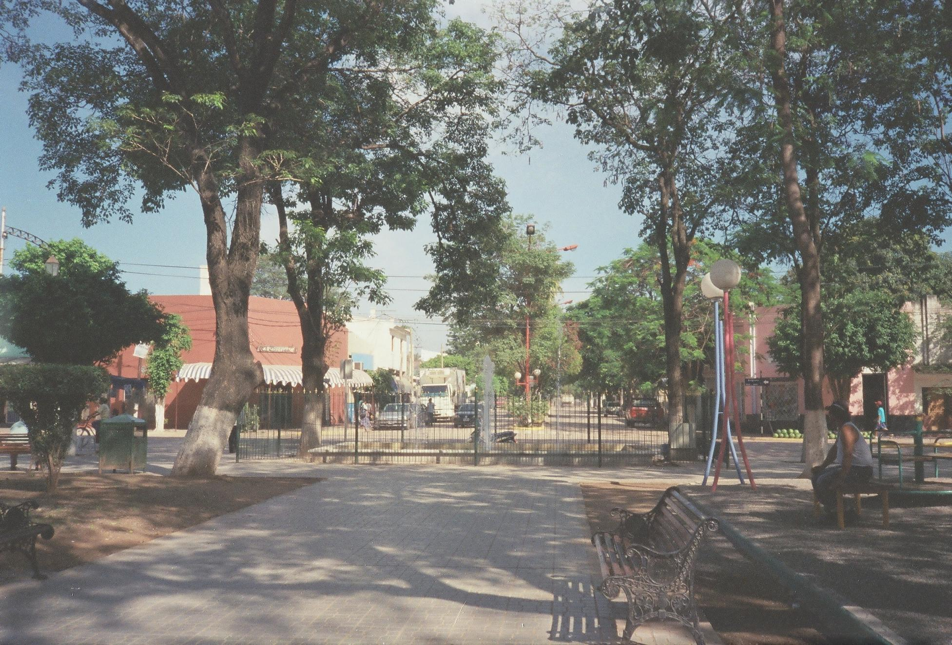 Plaza de Embarcación